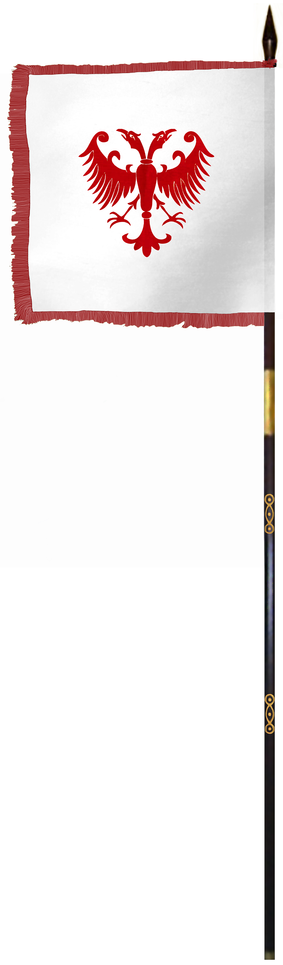 Опис слике: Краљевска династичка застава Немањића (верзија на белој подлози)